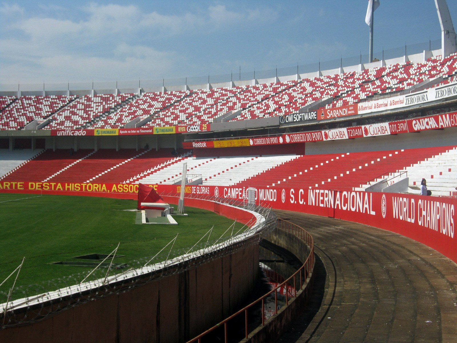 Porto Alegre 02 Internacional stadium (8)